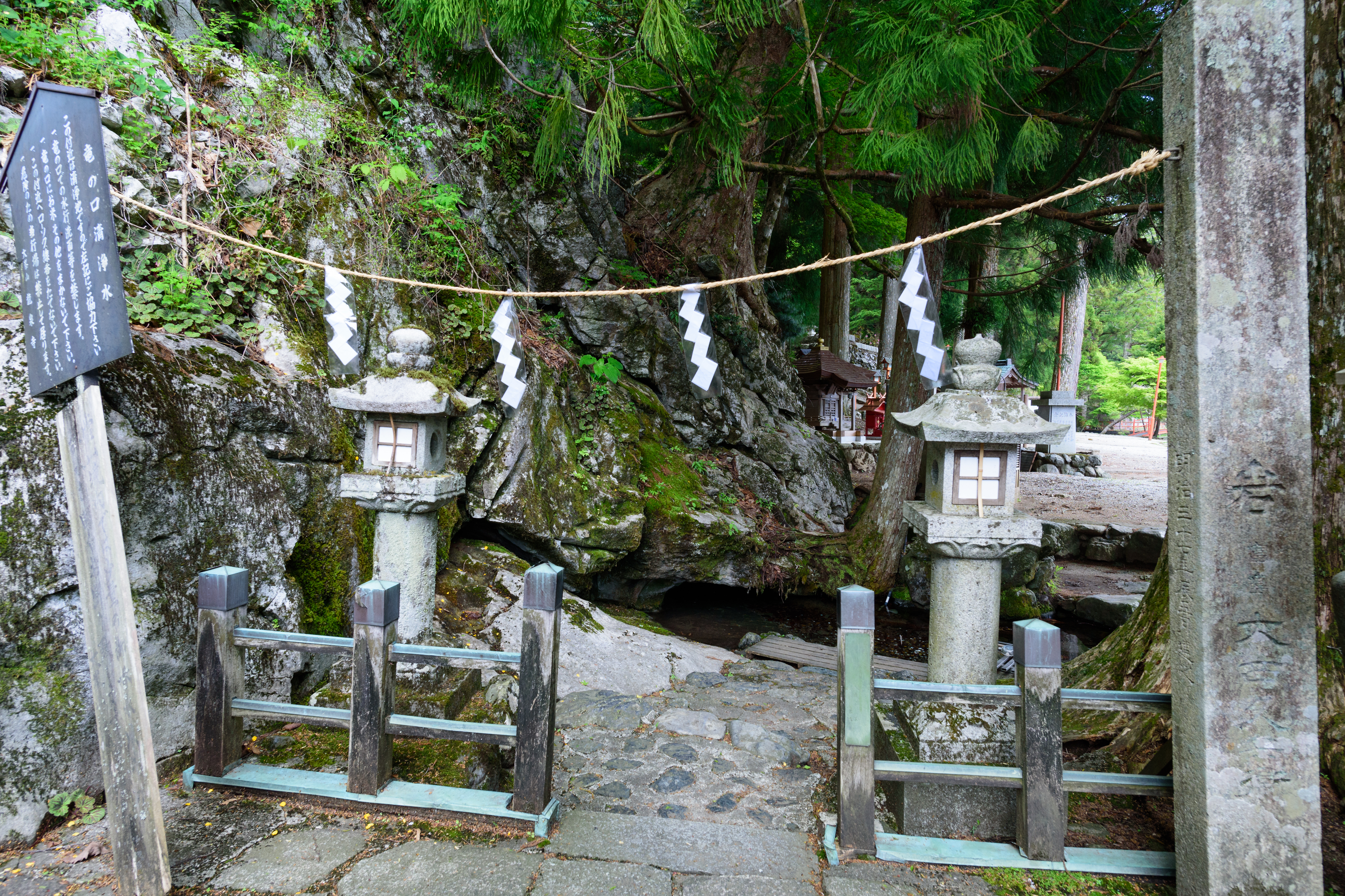 龍泉寺竜の口清浄水